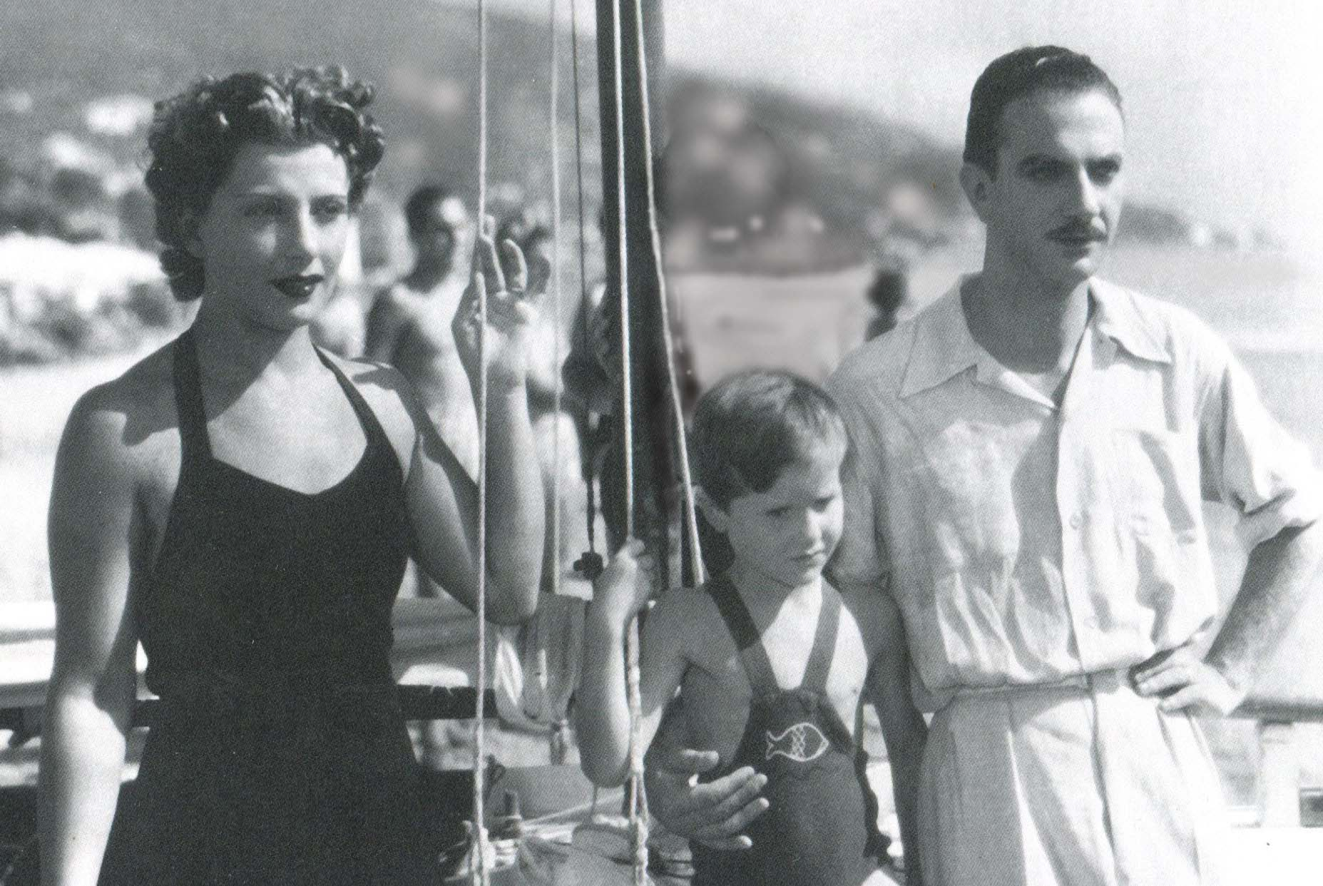 Isa Pola, Luciano De Ambrosis, Emilio Cigoli in "I bambini ci guardano" (de Sica, 1943)